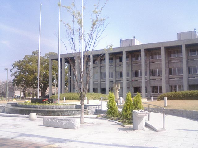 善通寺市の市役所 - 日本国香川県善通寺市。